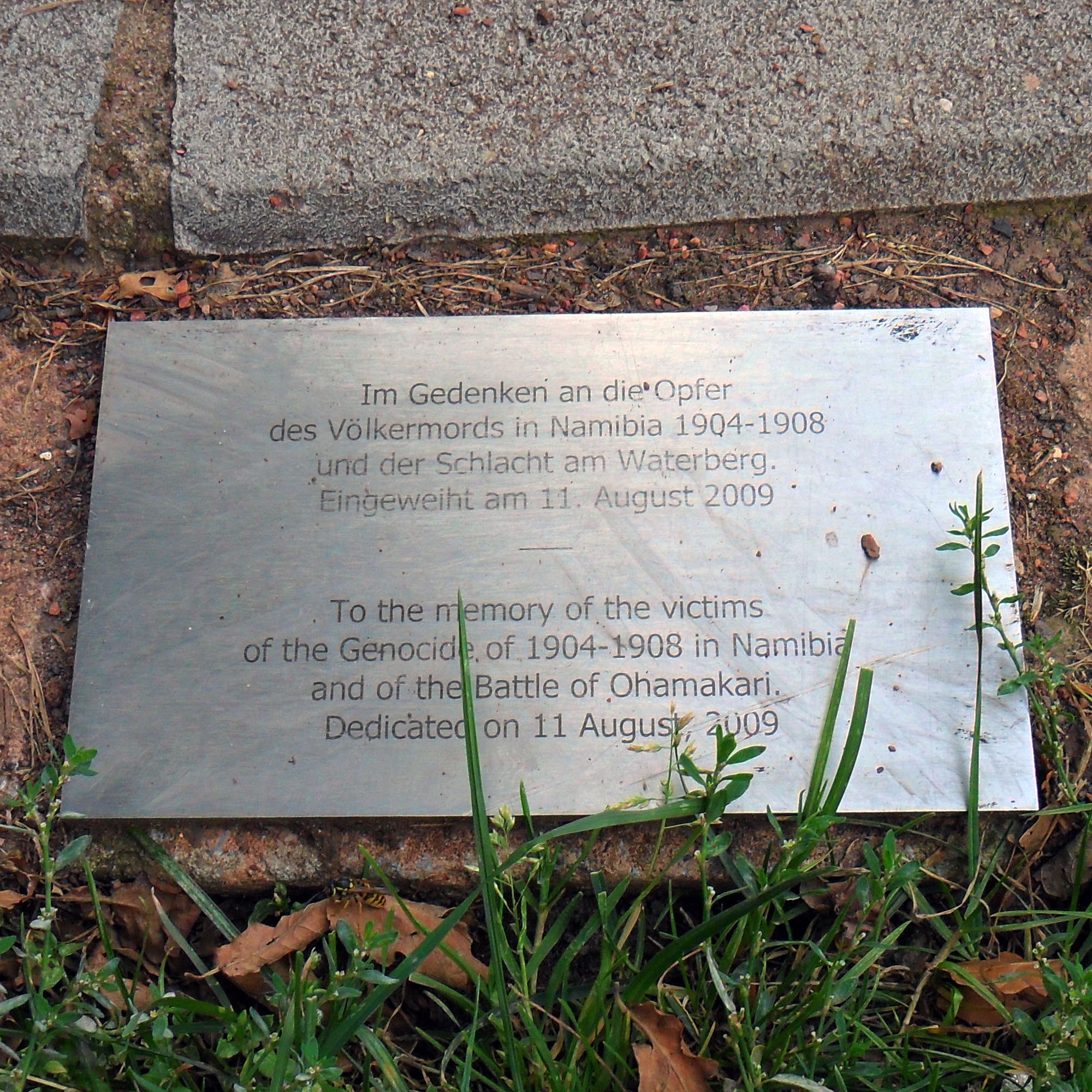 Inskrif op die metaalplaket vir Herero- en Nama-slagoffers van die Slag van Waterberg/Ohamakari in Duitswes-Afrika/Namibië. Die plaket is naby die Antikoloniale Gedenkteken te Bremen, Duitsland, aangebring. Ter gedagtenis aan die slagoffers van die volksmoord van 1904-1908 in Namibië en van die Slag van Waterberg. 11 Augustus 2009 opgedra